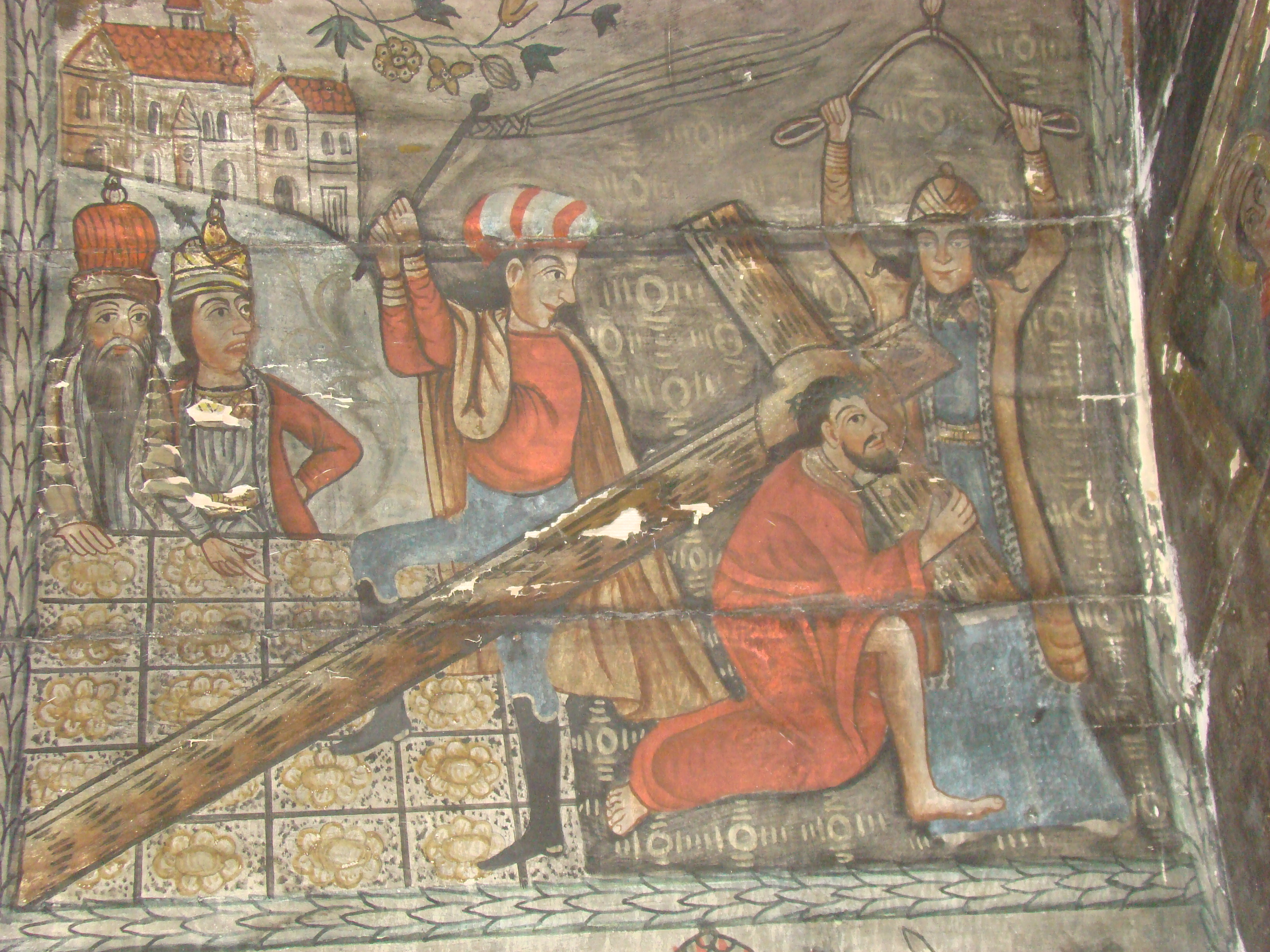 Biserica de lemn din Ticu-colonie, județul Cluj